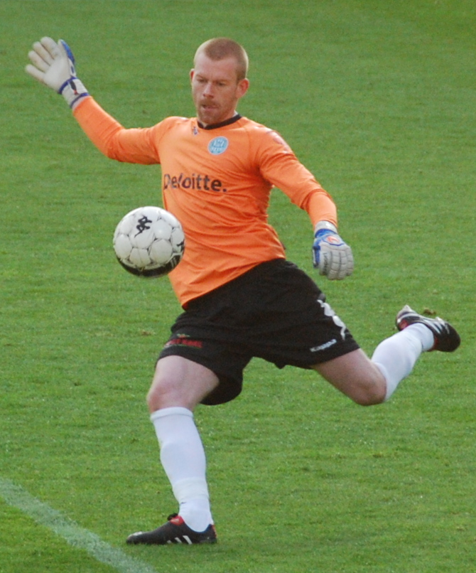 Fodboldspilleren Robert Veselovsky fra Viborg FF. Her i 1. divisionskampen mod Hobro IK på Viborg Stadion.